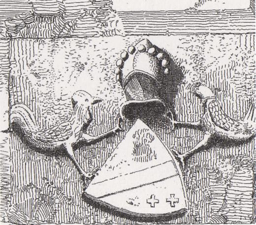 Bourg, Gironde (France) ; écusson surmontant la porte de la mer ( ou du Port ).